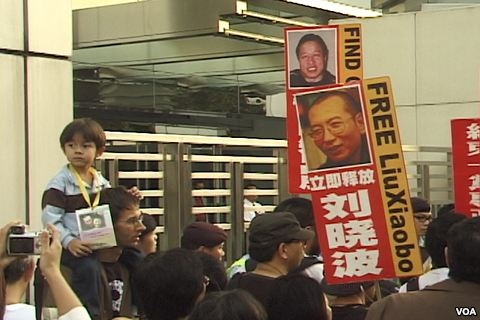 2010年刘晓波获得诺贝尔和平奖后香港民众要求北京当局释放刘晓波并让他出国领奖（美国之音黎堡拍摄）